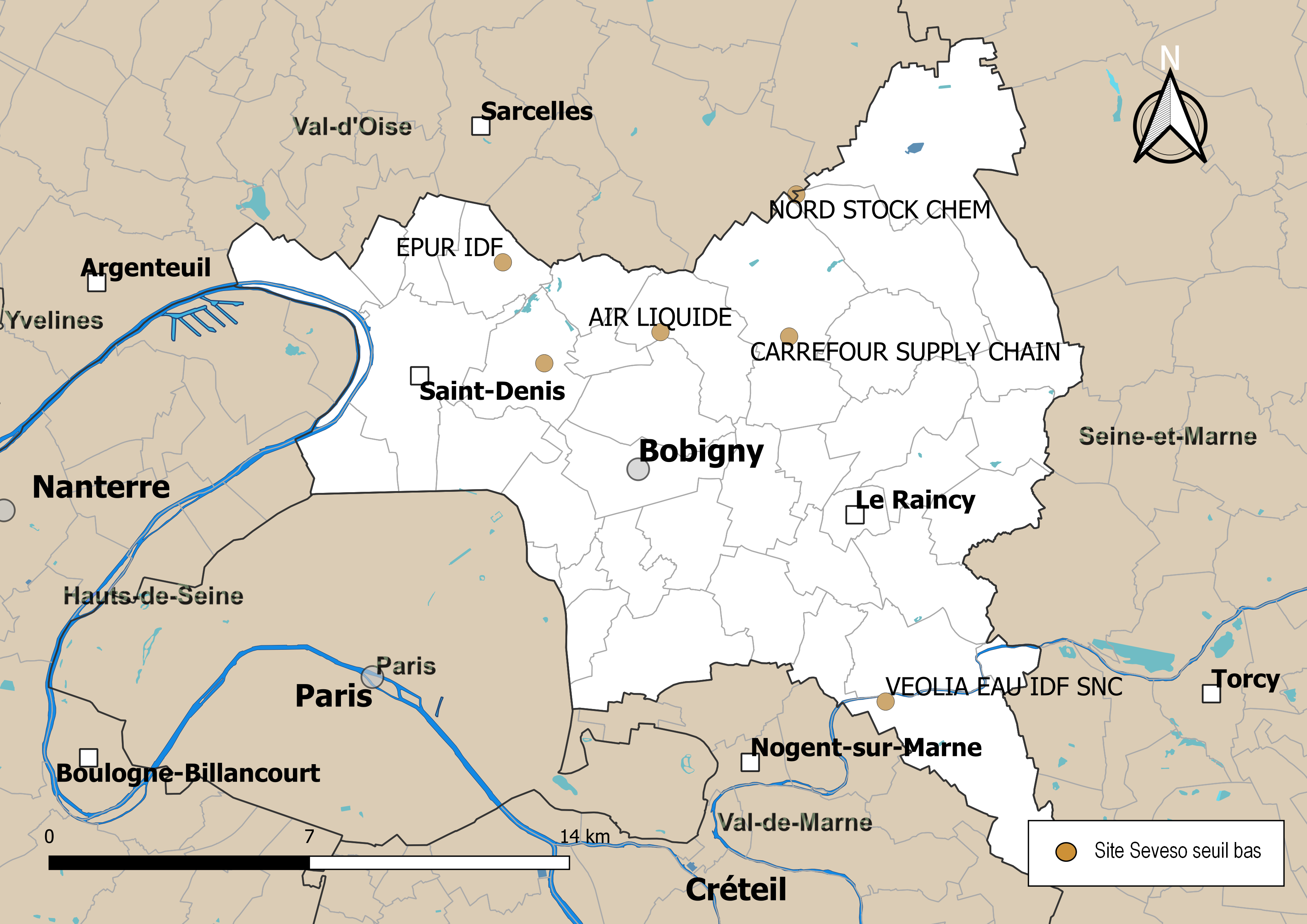 Carte de localisation des sites Seveso seuil bas dans le département de Seine-Saint-Denis (Île-de-France, France). Carte arrêtée au 10 novembre 2019.